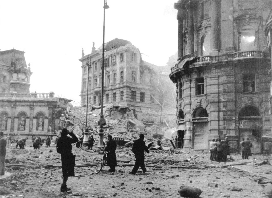 Der Albertinaplatz mit Blick auf die Albertina und den Philipphof nach dem Bombentreffer vom 12. März 1945 © Archiv Albertina